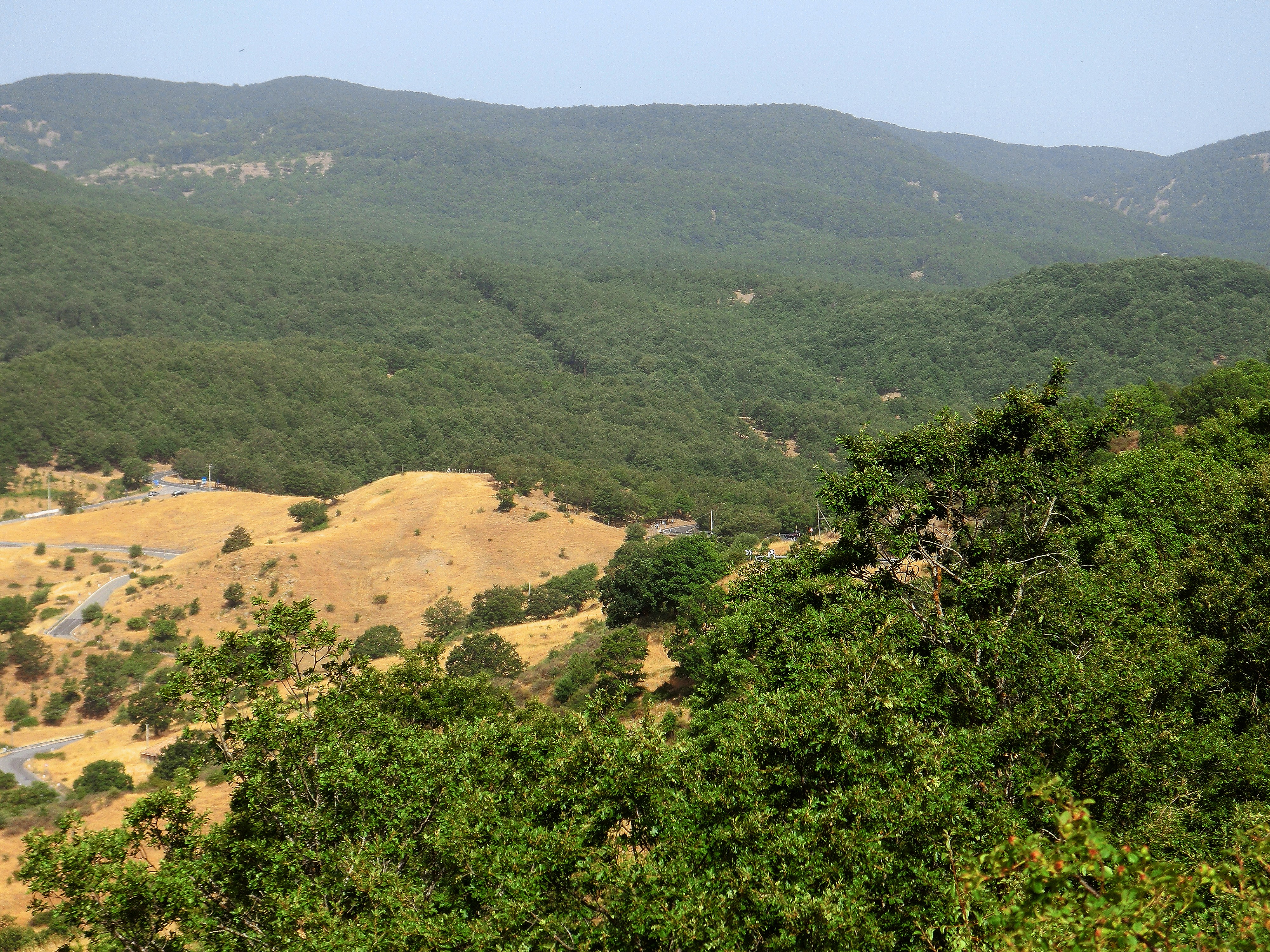 zone verdi e aria buona.